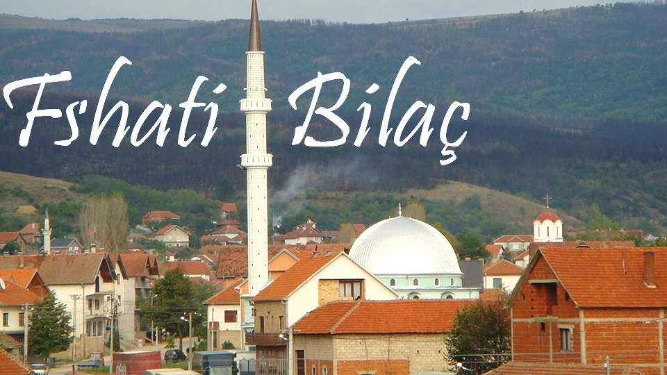 fshati